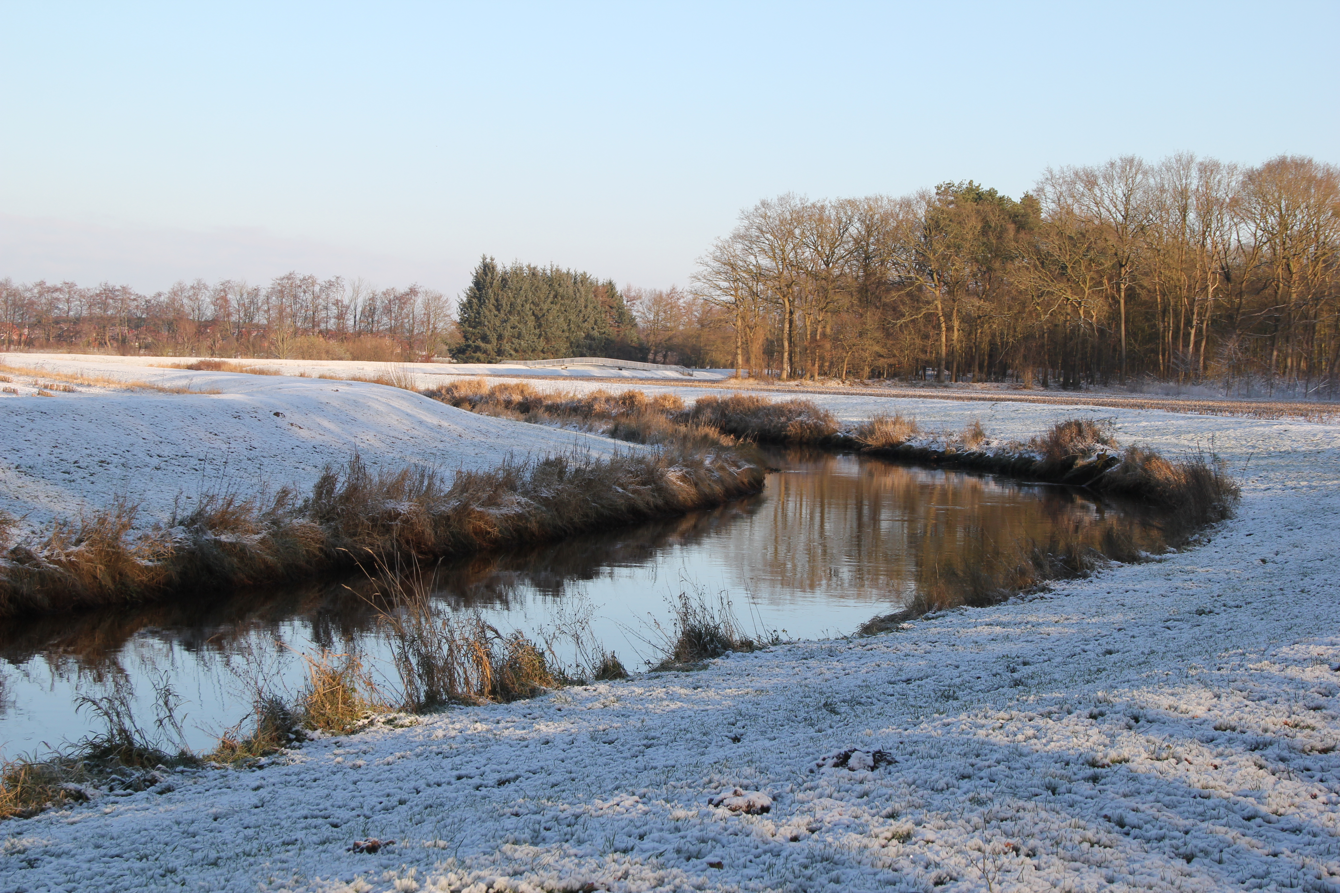 Sagter Ems bei Ramsloh